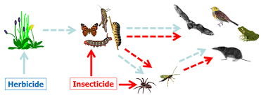 Pesticīdu akumulēšanās dzīvajos organismos